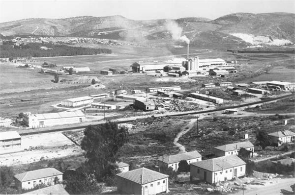 בית שמש - בית חרושת למלט "שמשון"